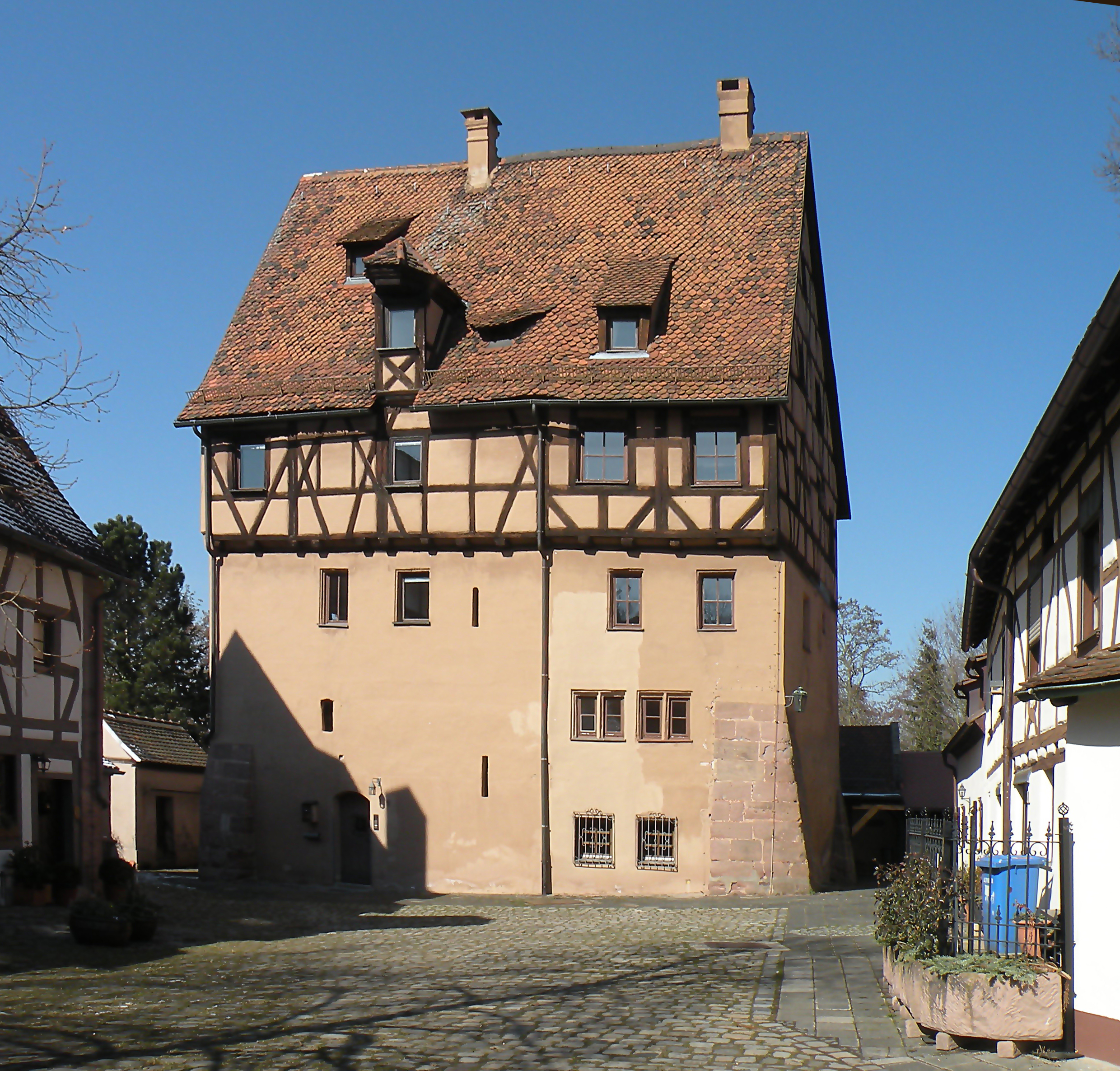 Замок Халлершлосс в Мёгельдорфе (Нюрнберг)